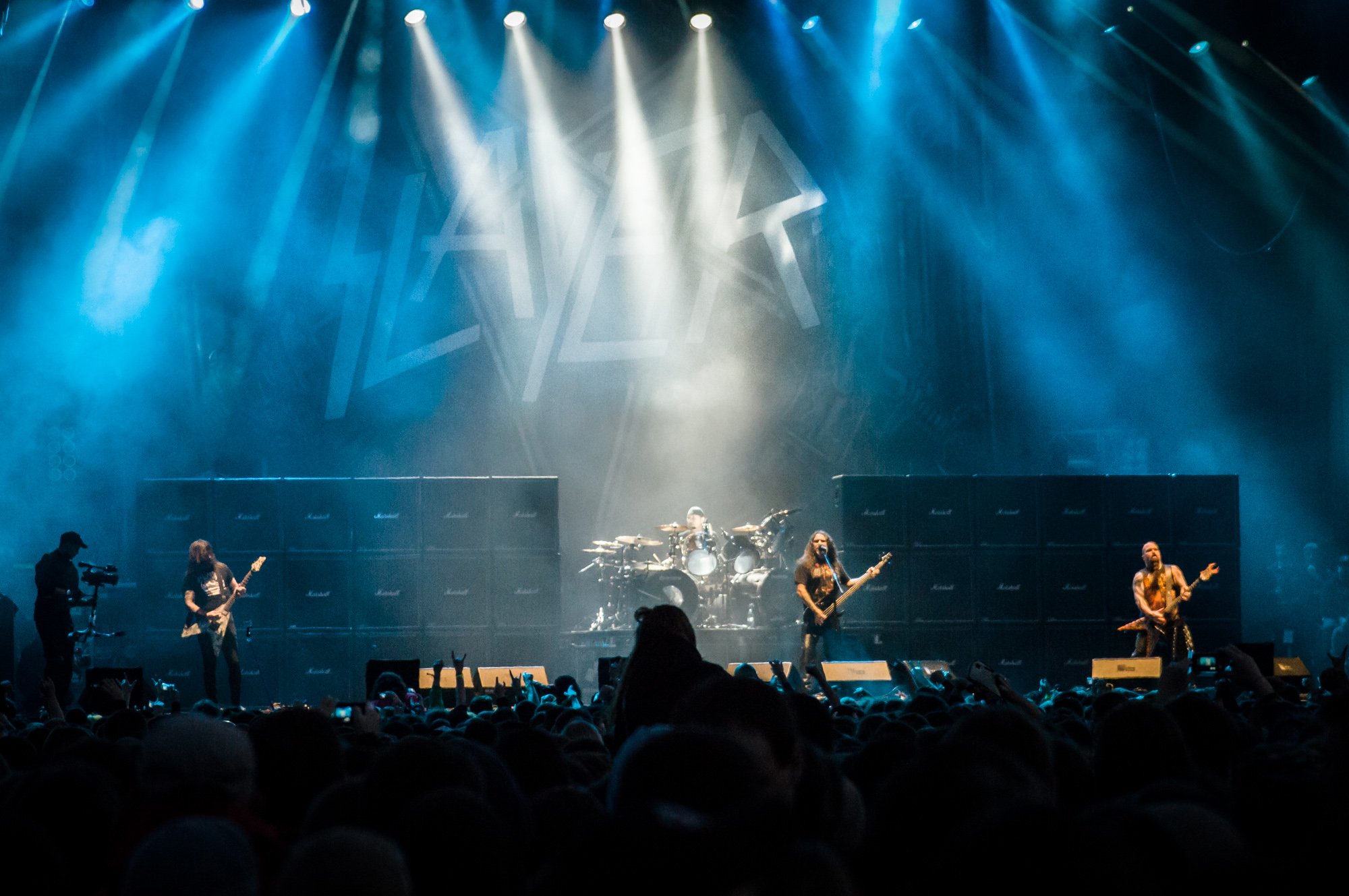 Zespół Slayer podczas koncertu na Ursynaliach 2012, Warszawa.